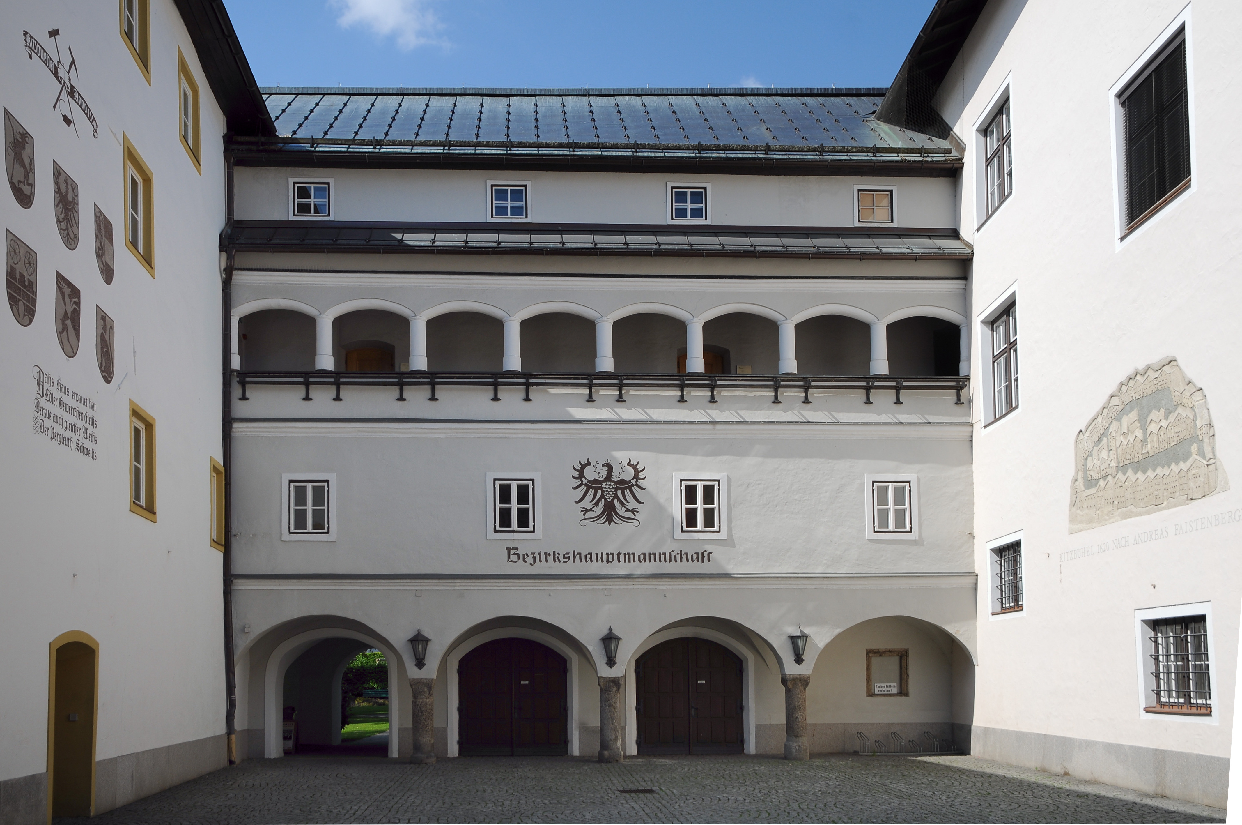 Bezirkshauptmannschaft - Hinterstadt 28-30, Kitzbühel.